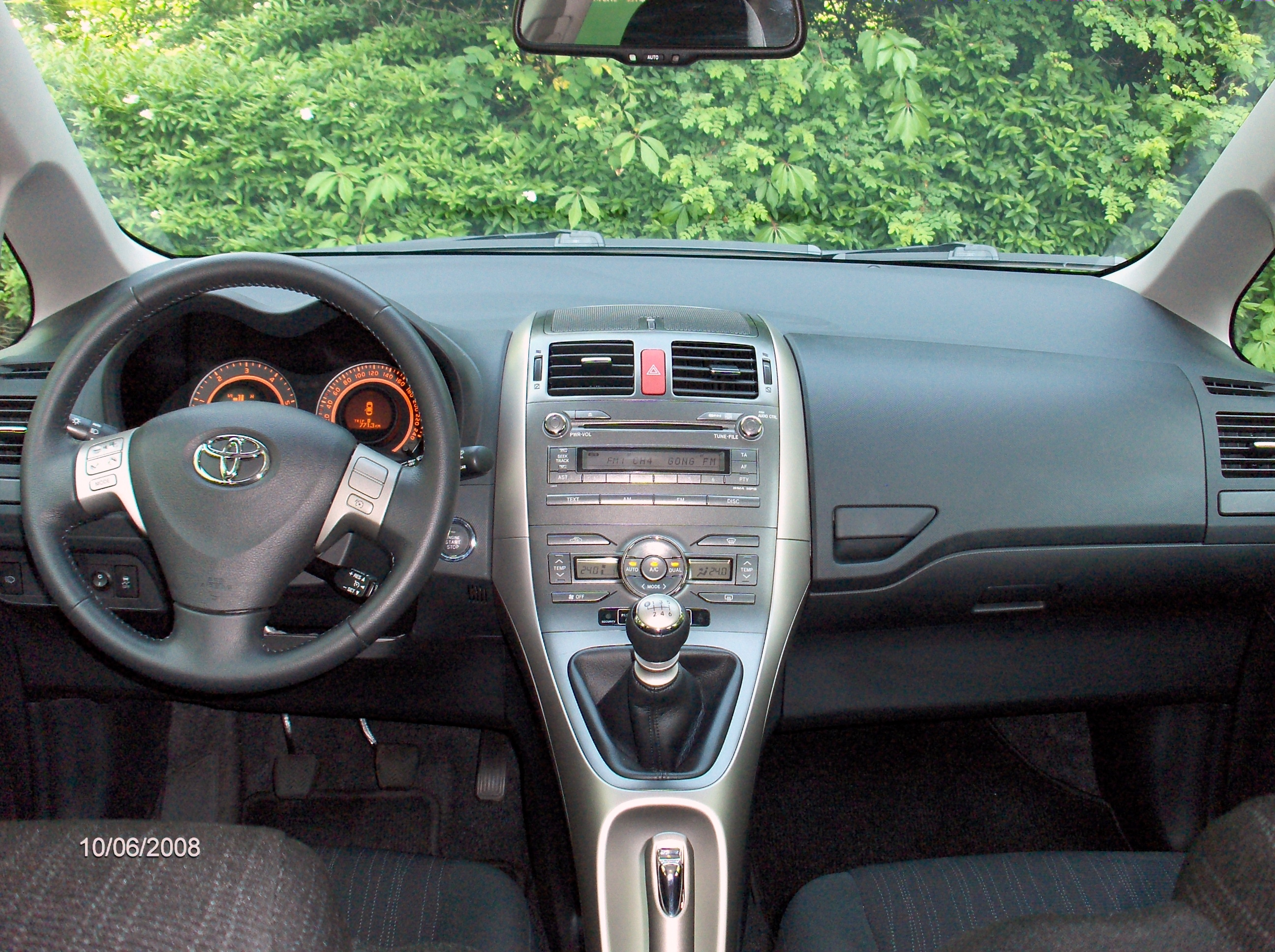 Interieur eines Toyota Auris D-4D Executive